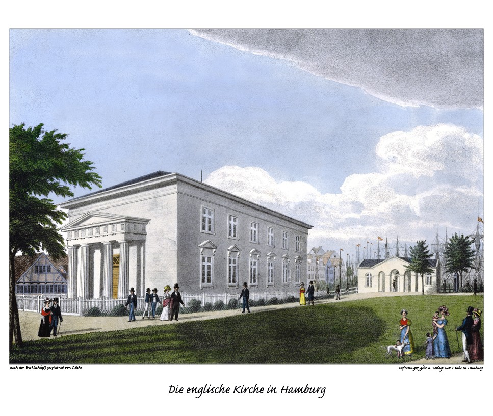 Die englische Kirche in Hamburg, gezeichnet von Christoffer Suhr, Litho von Peter Suhr (vermutlich nicht die heutige Kirche am Zeughausmarkt, sondern der Vorgängerbau am Johannisbollwerk, erkennbar an den Seglermasten im Hintergrund, die auf eine Nähe zum Hafen hindeuten)